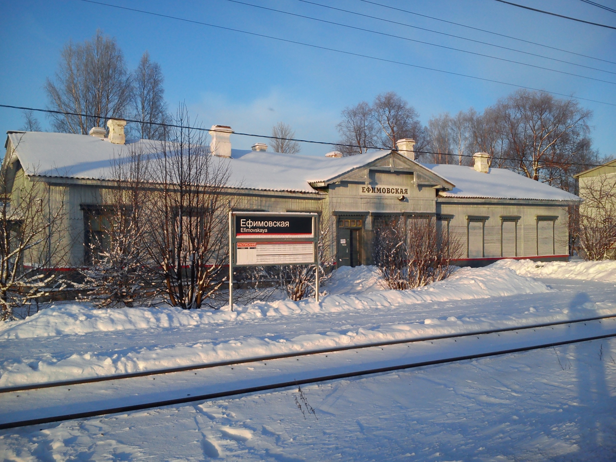 Вокзал